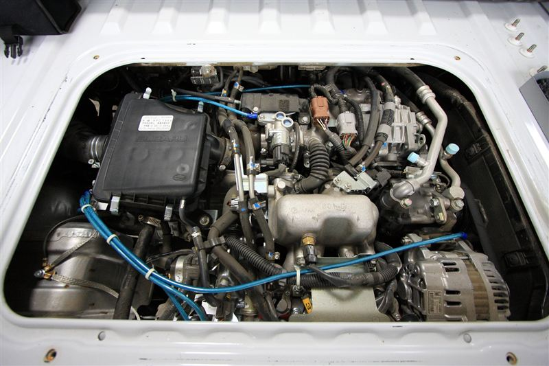 最終型サンバートラックスーパーチャージャー仕様のメンテナンスハッチ内部。